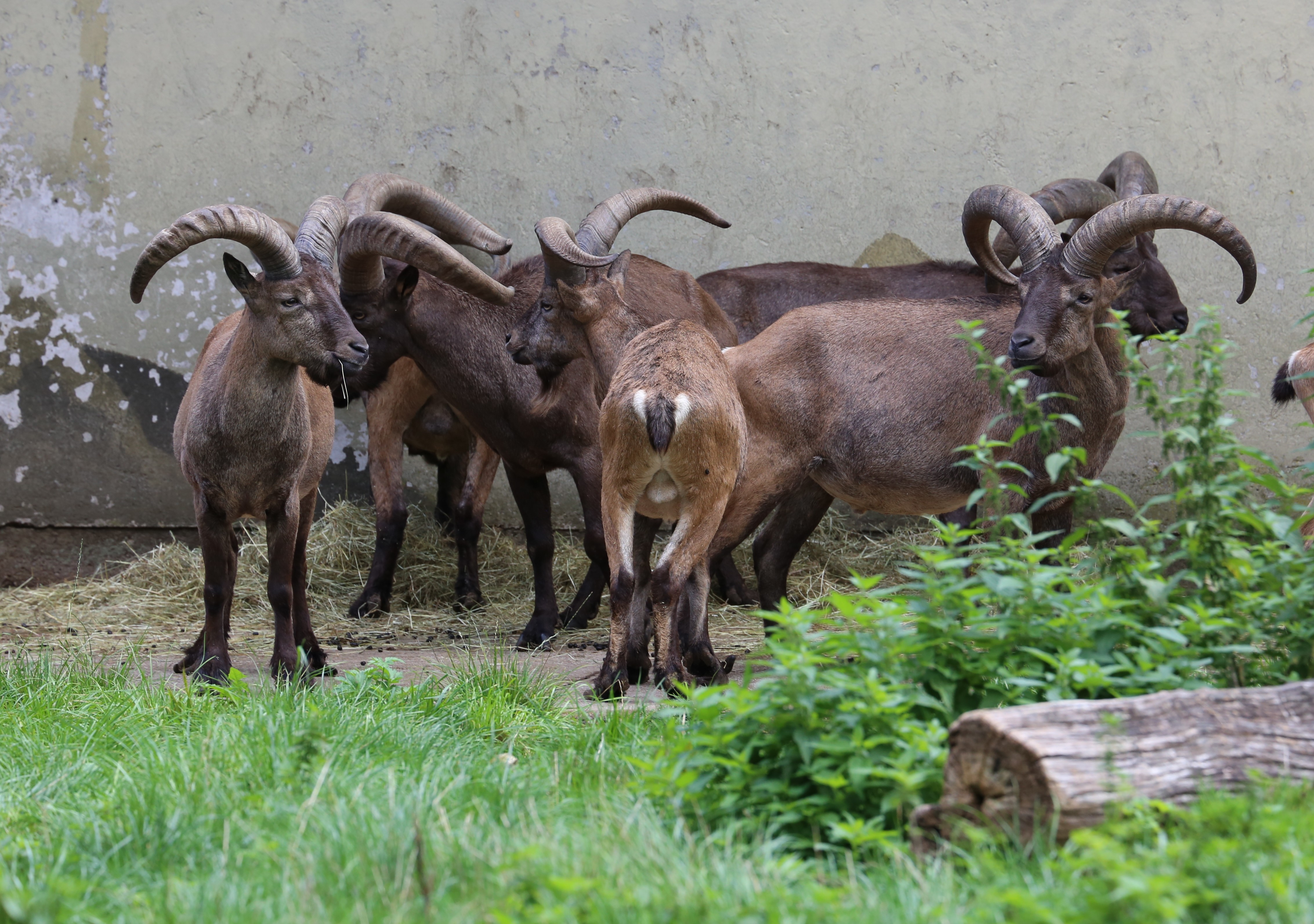 Daghestanischer Tur (Ostkaukasischer Steinbock), Capra cylindricornis, Zoo Augsburg